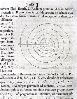 טענה 15 בספר השני של הפרינקיפיה של ניוטון.